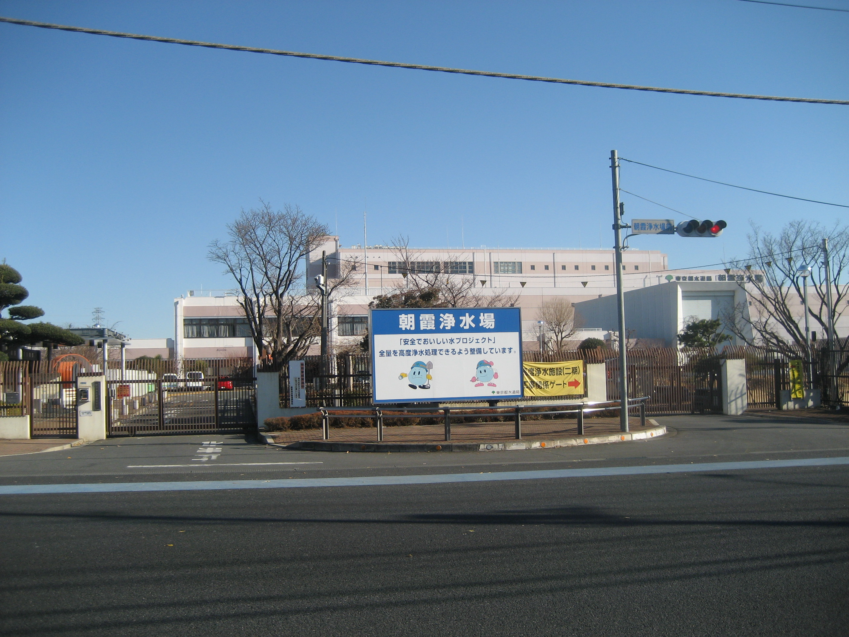 東京都水道局朝霞浄水場（正門付近を撮影）